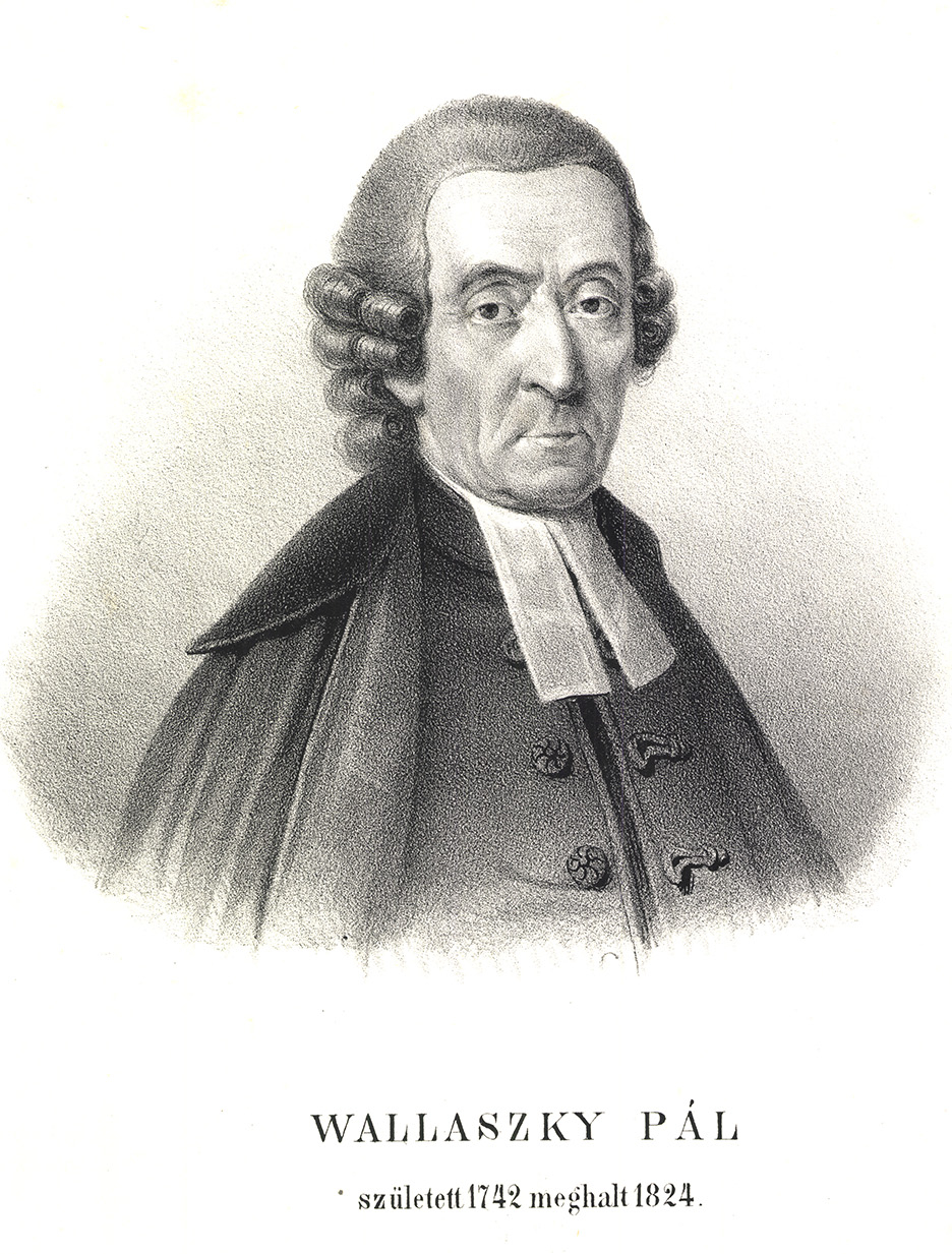 Wallaszky Pál (Bagyan, 1742. január 29. – Jolsva, 1824. szeptember 29.) irodalomtörténész, evangélikus lelkipásztor.